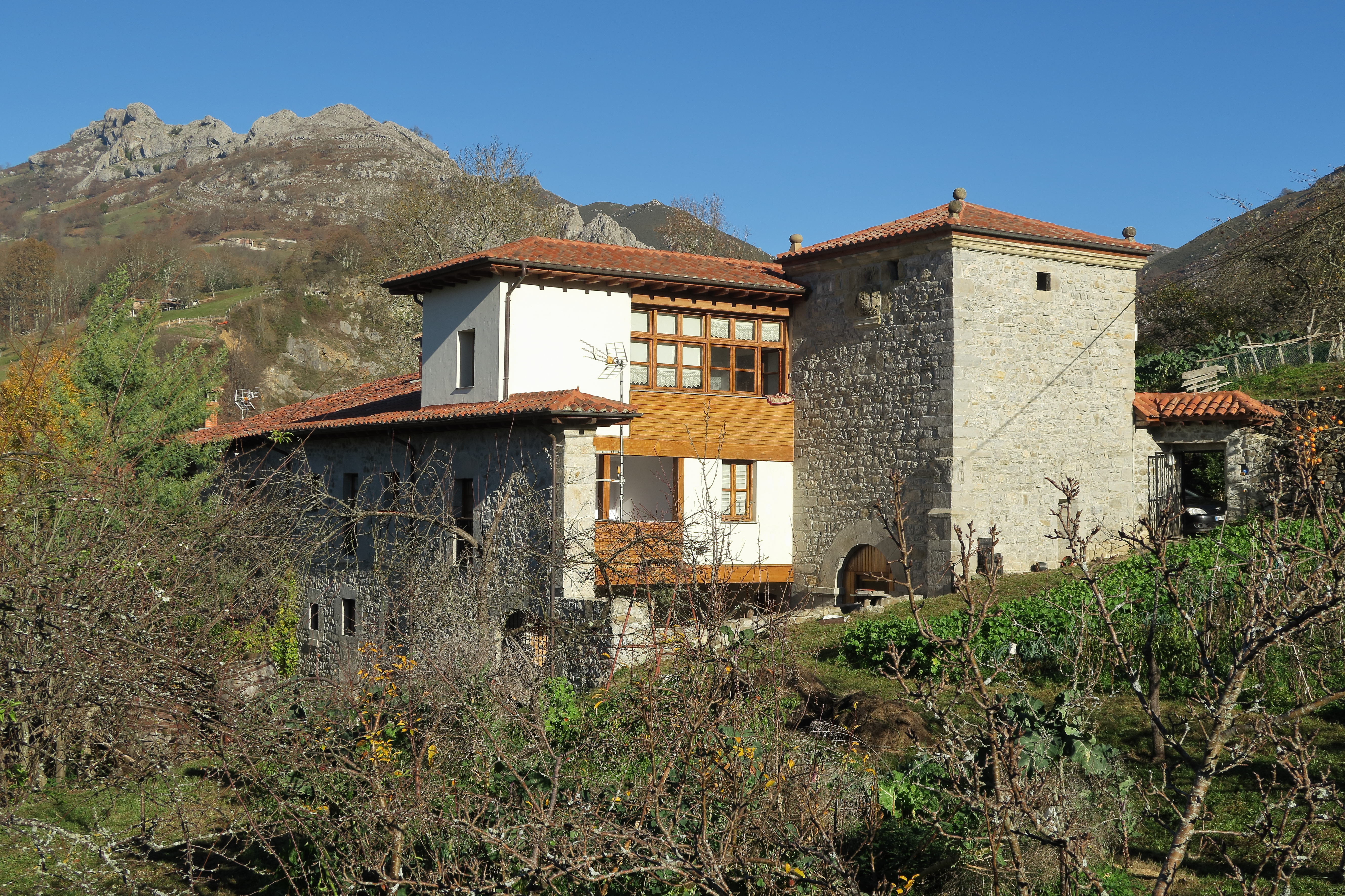 Casona de los Menéndez, La Aldea (Laviana)